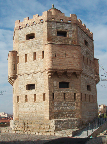 La Torre Monreal de Tudela, en 2007